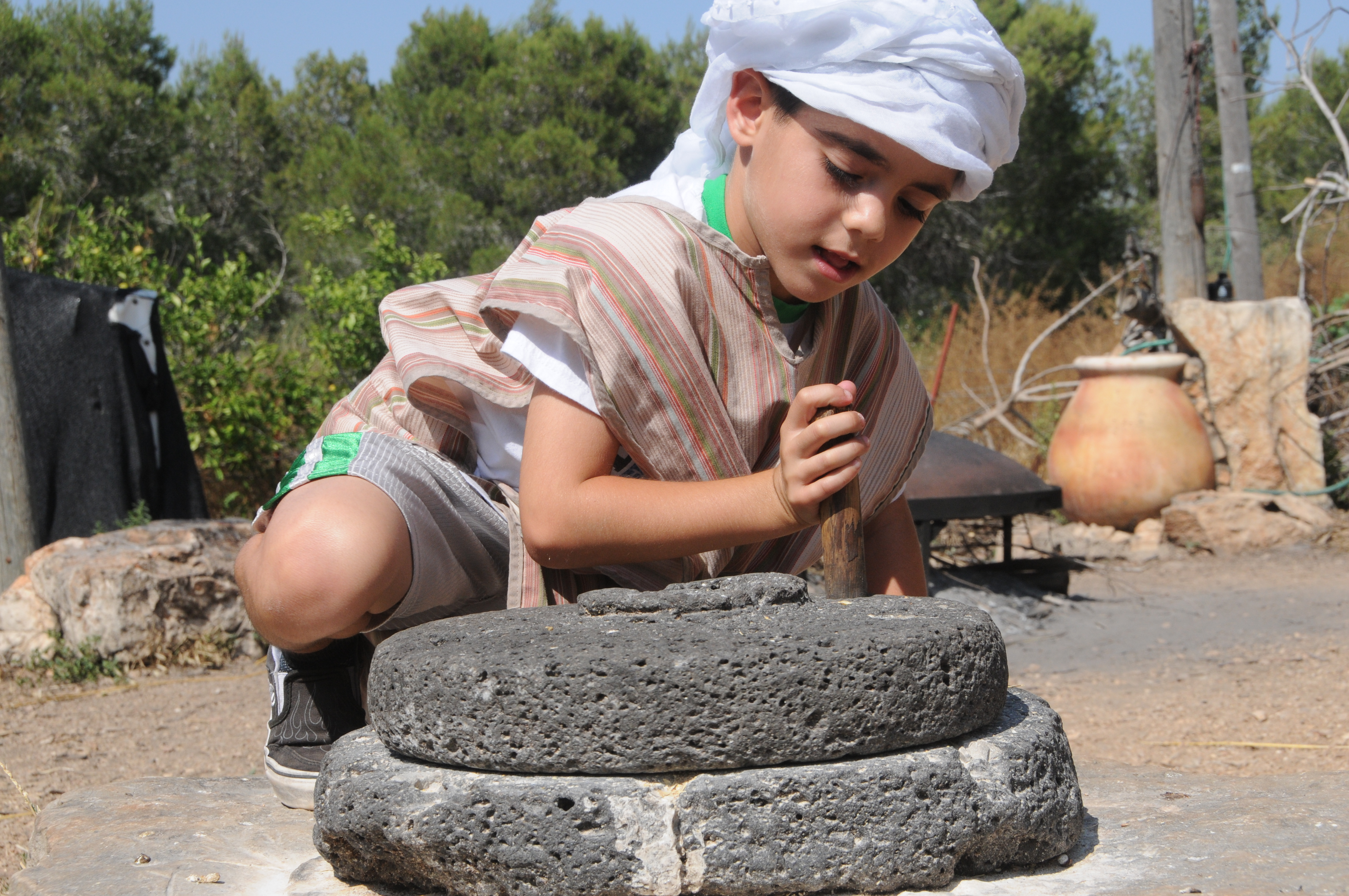 פעילות דגן בכפר קדם